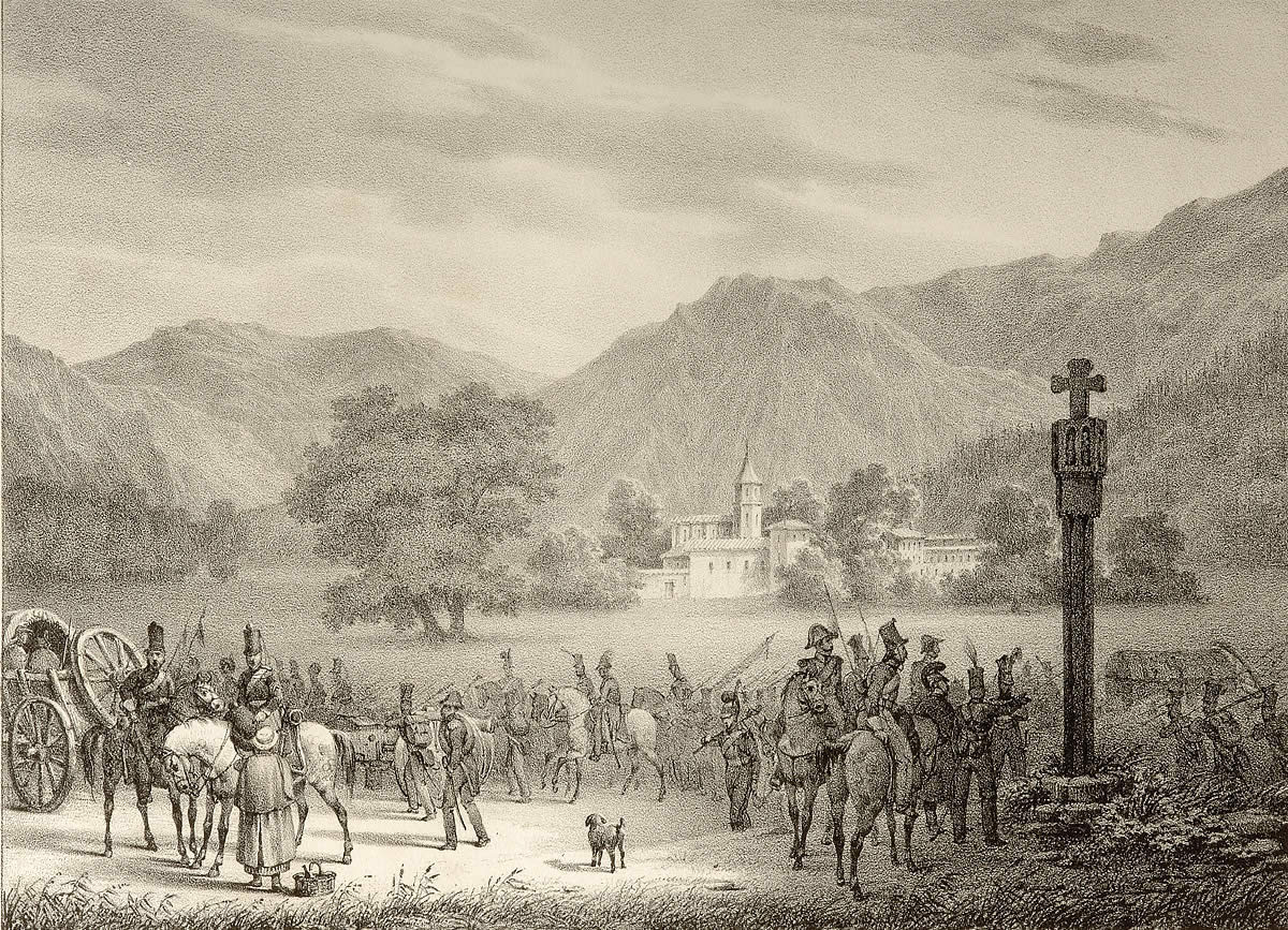 Vista del pasó de los Cien Mil Hijos de San Luis por el paso de Roncesvalles.